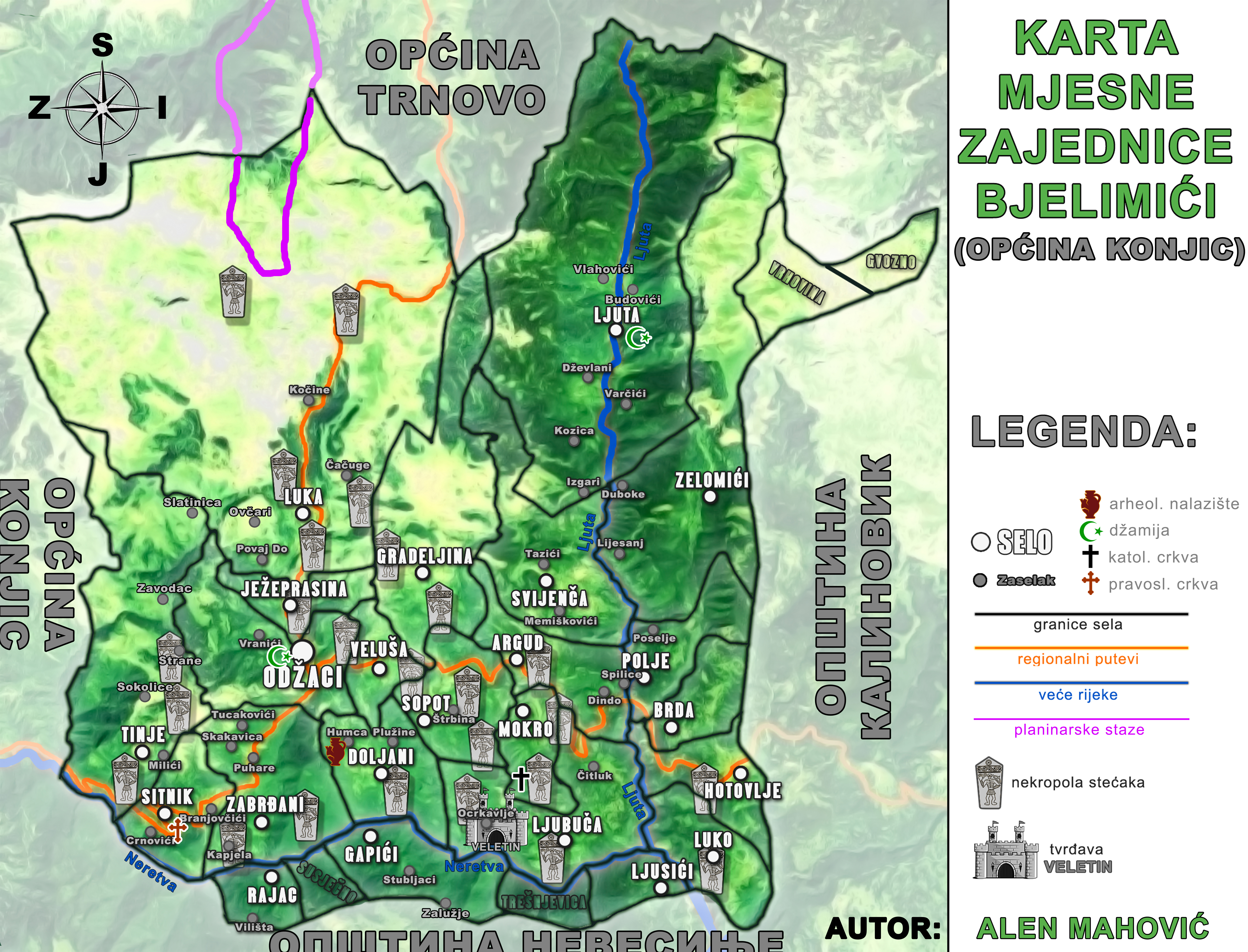 Karta MZ Bjelimići sa selima, zaseocima, značajnijim kulturnim spomenicima i vjerskim objektima.